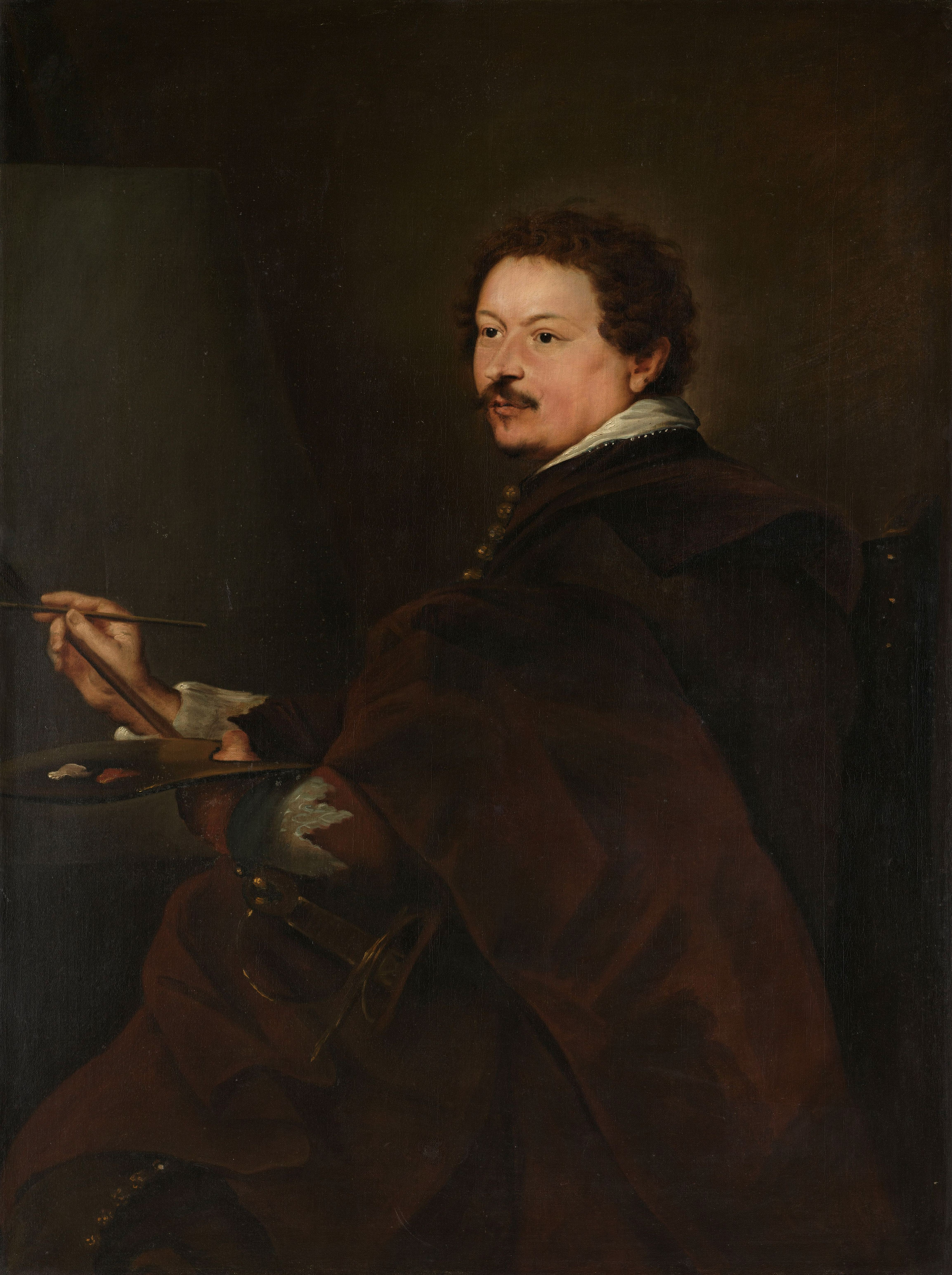 Portret van de schilder Andries van Eertvelt, zittend werkend aan een schilderij. Penseel in de rechterhand, palet in de linker. Kopie naar het origineel in Augsburg.